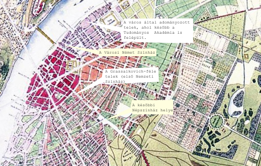 A Nemzeti Színház tervezett és első két ideiglenes épületeinek, illetve a Német Színház helye Blaschnek Sámuel Benjámin 1832-es Pest és Buda térképén